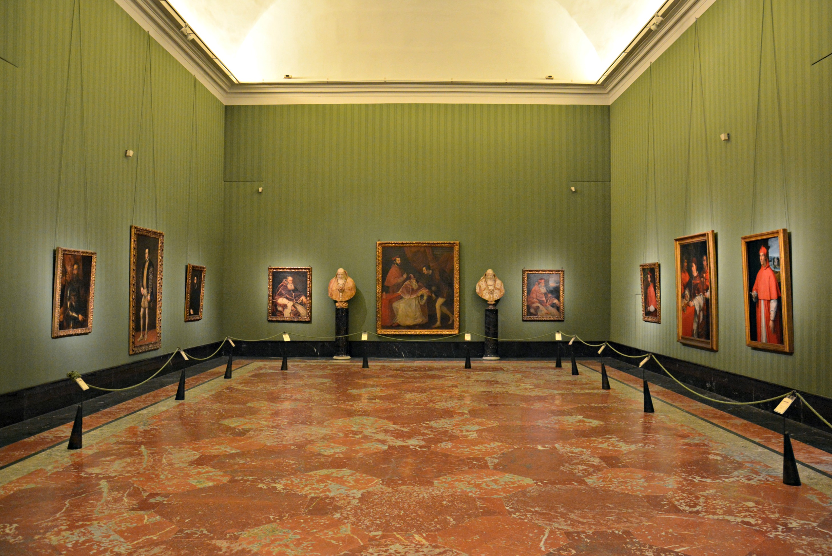 Vedi titolo